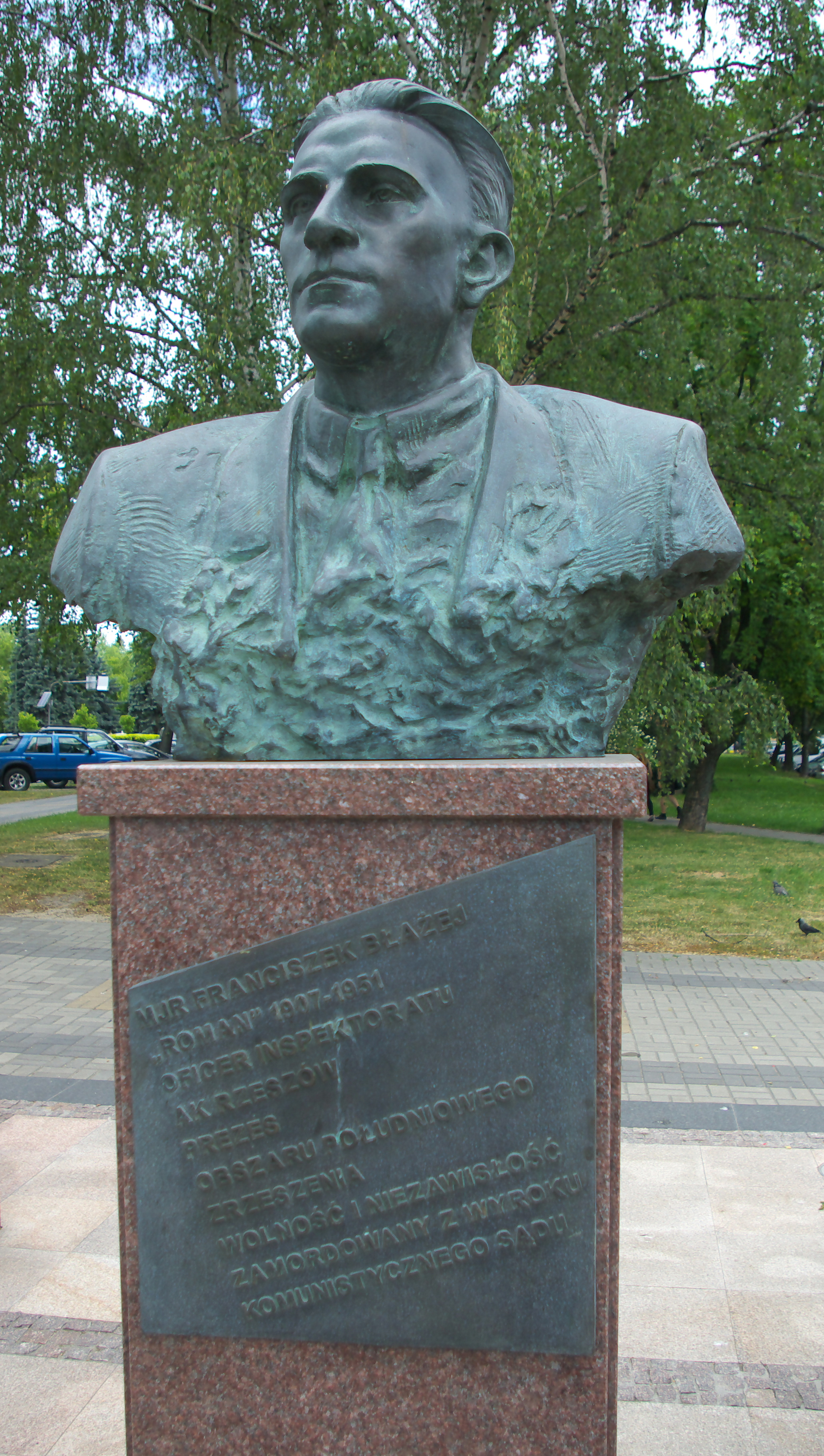 Pomnik Żołnierzy Wyklętych w Rzeszowie przy Alei Łukasza Cieplińskiego. Upamiętniony Franciszek Błażej